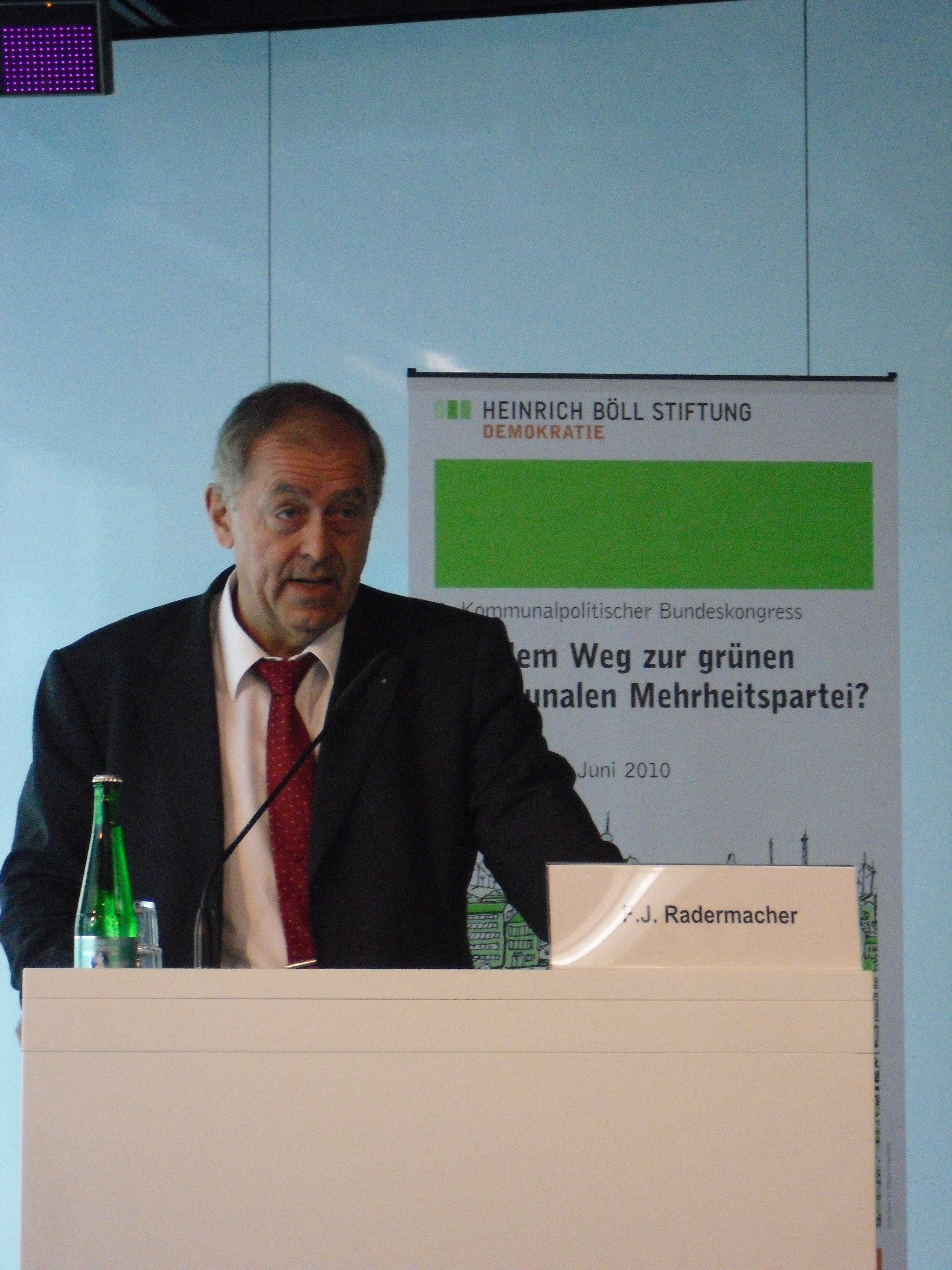 Radermacher lehrt an der RWTH Aachen und ist u.a. Mitglied im Club of Rome